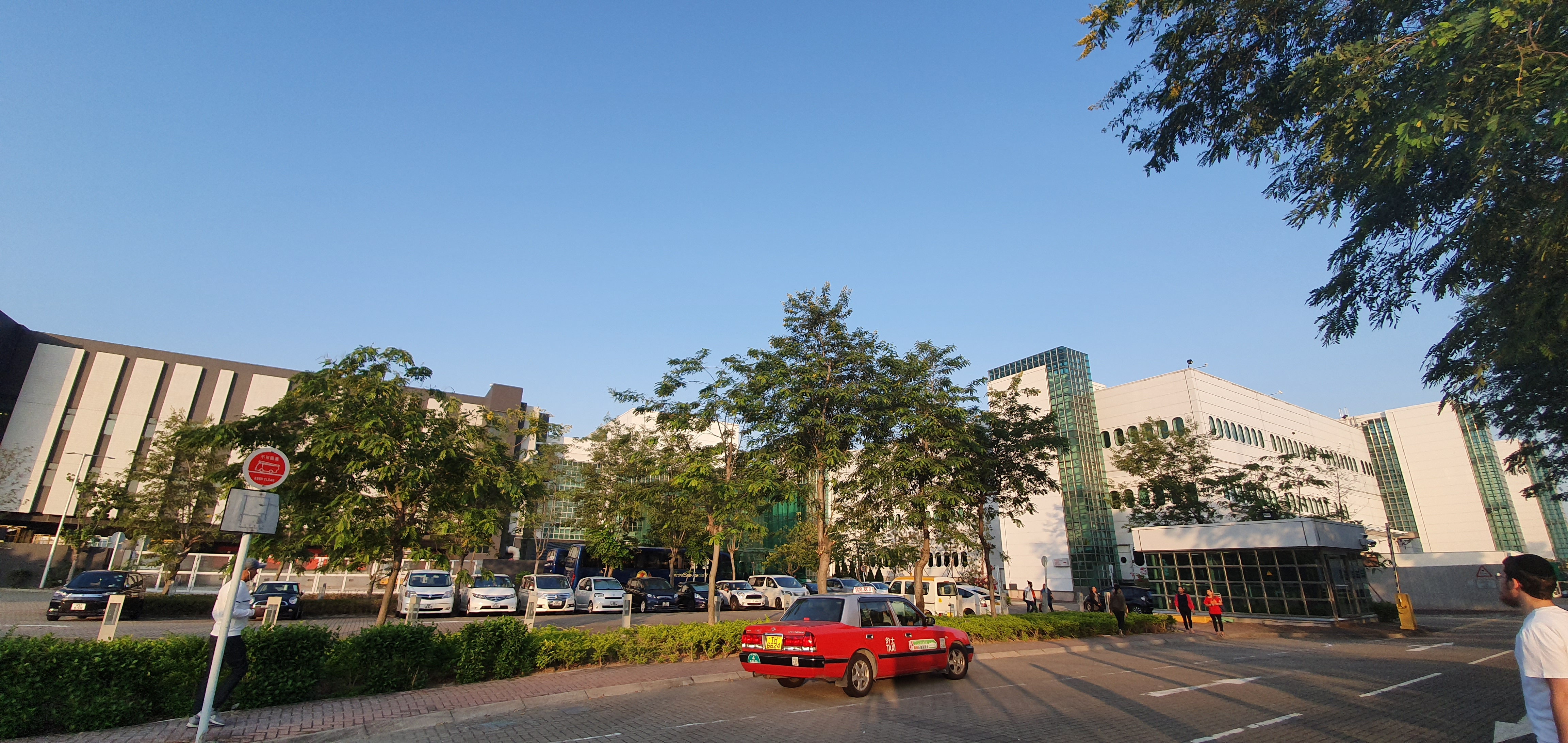 משרדי קת'אי פסיפיק